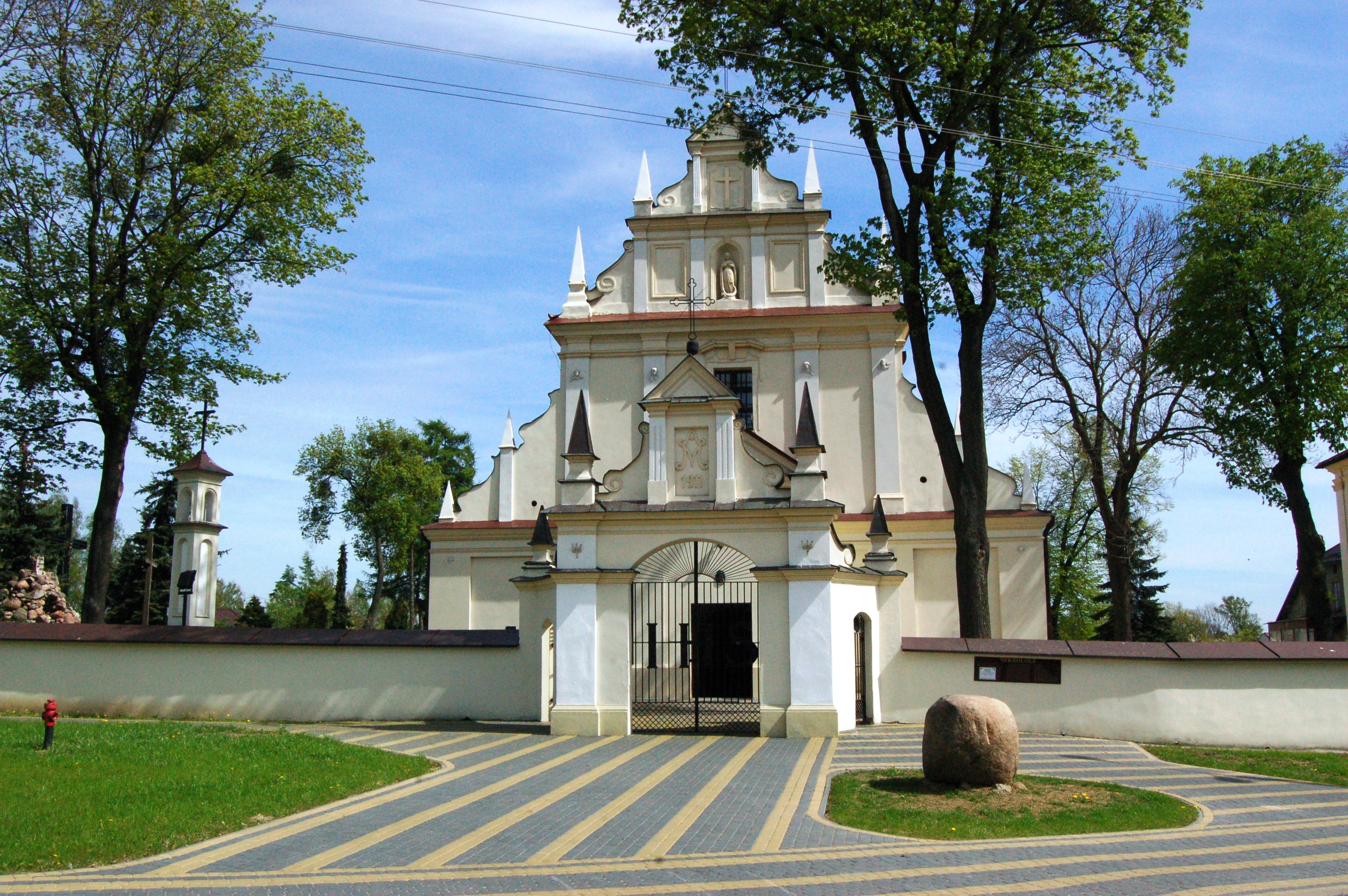 Kurów - kościół parafialny p.w. Narodzenia NMP i św. Michała Archanioła